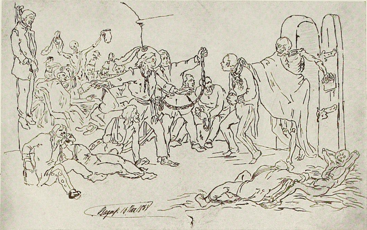 Kerkerszene von Friedrich Schöpfer, November 1848